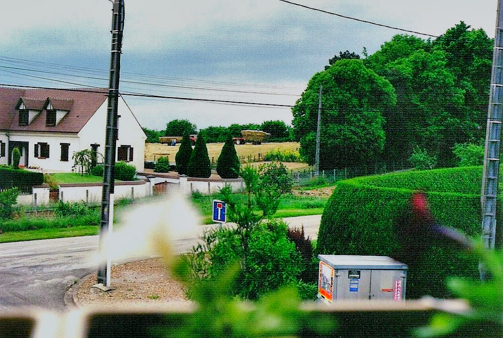 Authon du Perche, France, champ, Avenue Pierre et Marie Curie, 1993